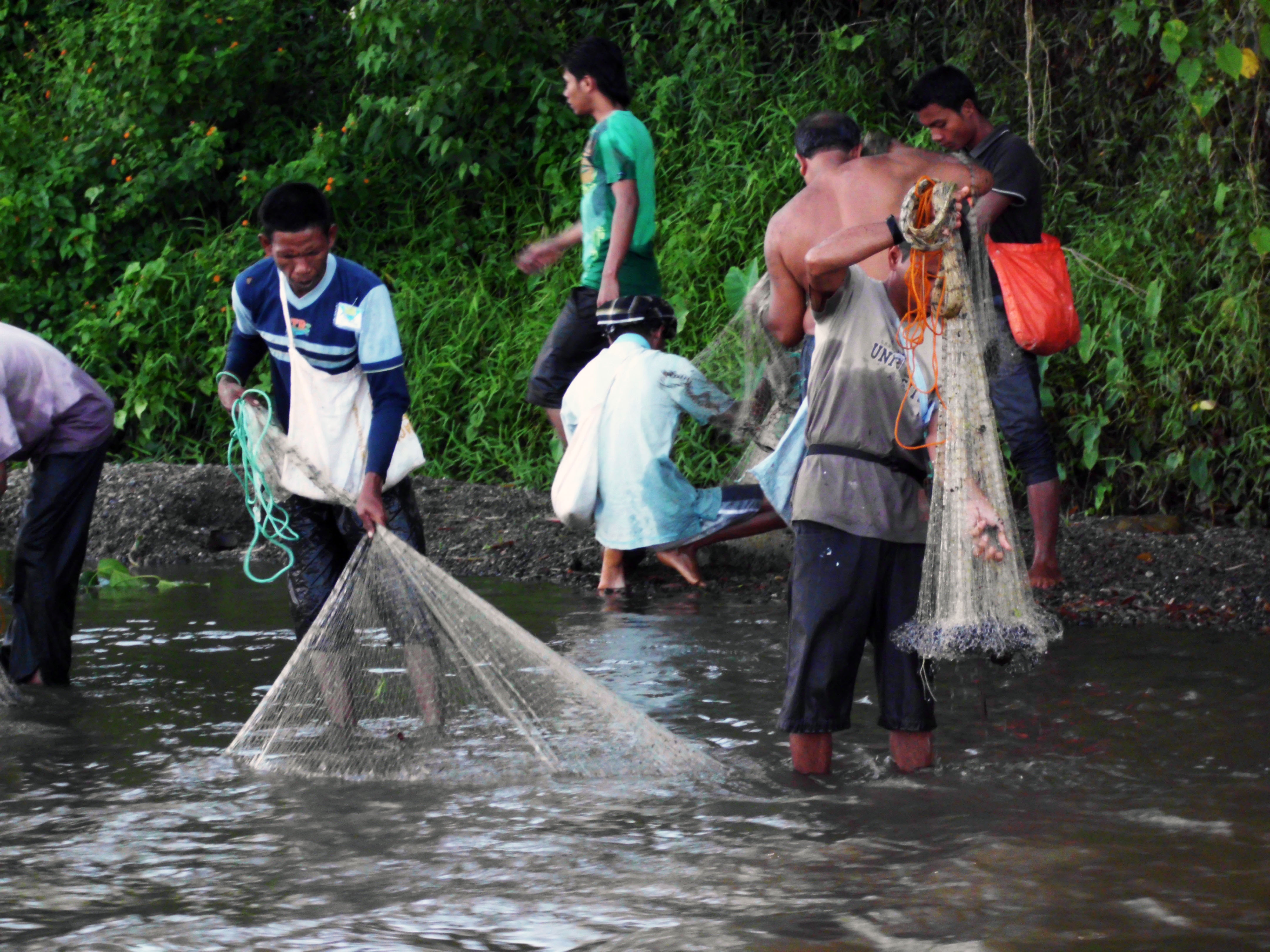 Tangkap ikan larangan merupakan tradisi di kabupaten Pasaman Timur, Sumatera Barat. Peserta dibebaskan menangkap ikan yang sebelumnya dilarang untuk diambil.